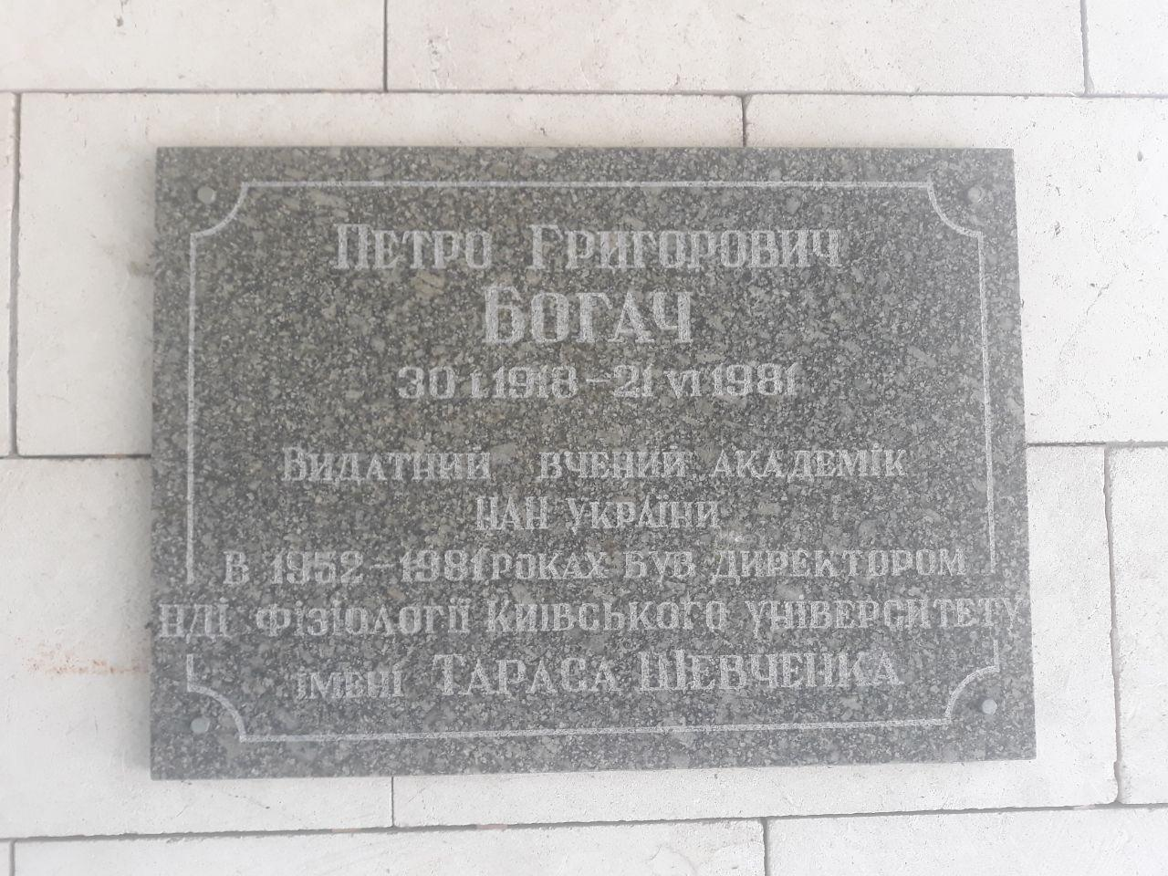 Памятная доска Петру Григорьевичу Богачу на здании КНУ им. Шевченко